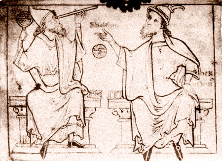 Crtež Euklida (levo) i Hermana Dalmatina (desno) u spisu delu Velika kronika (Chronica maiora), engleskog istoričara i benediktanca Mateja Pariškog (Mattew of Paris). Ilustracija svedoči da je autoru poznata Hermanova revizija prevoda Euklidovih Elemenata.